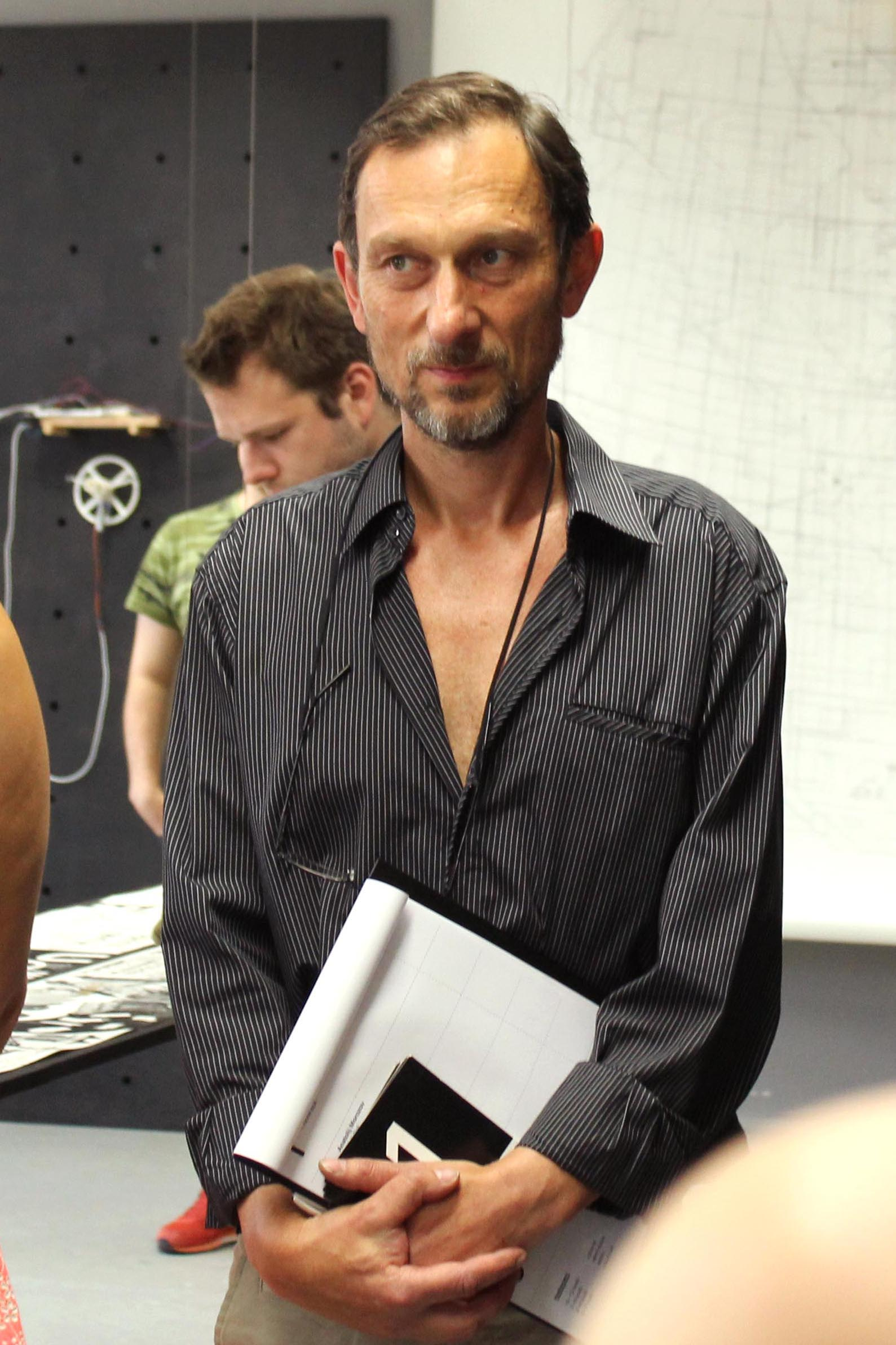 doc. ak. mal. Michal Slejška